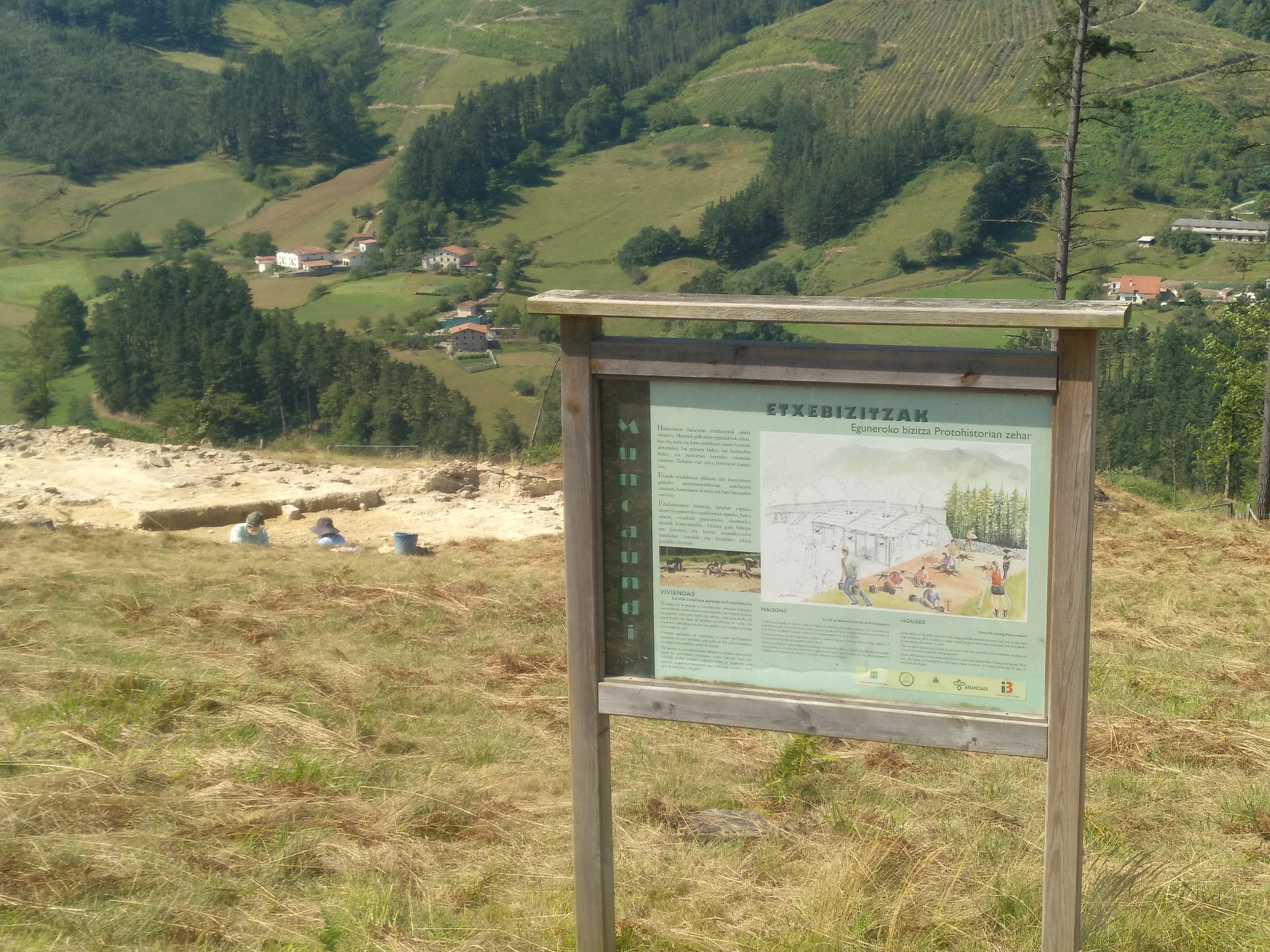 Munoaundi aztarnategi protohistorikoa Azkoitian industen 2020 urtean